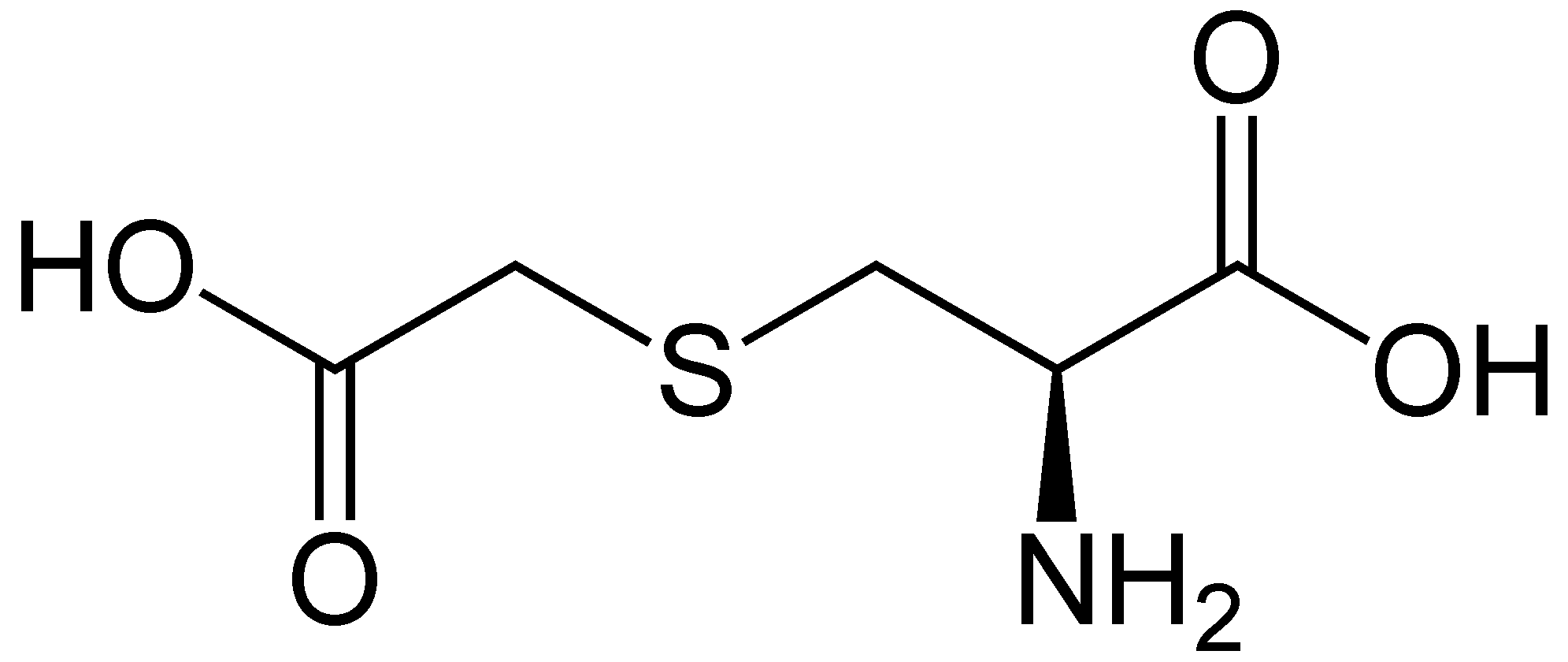 Carbocystein Formulae